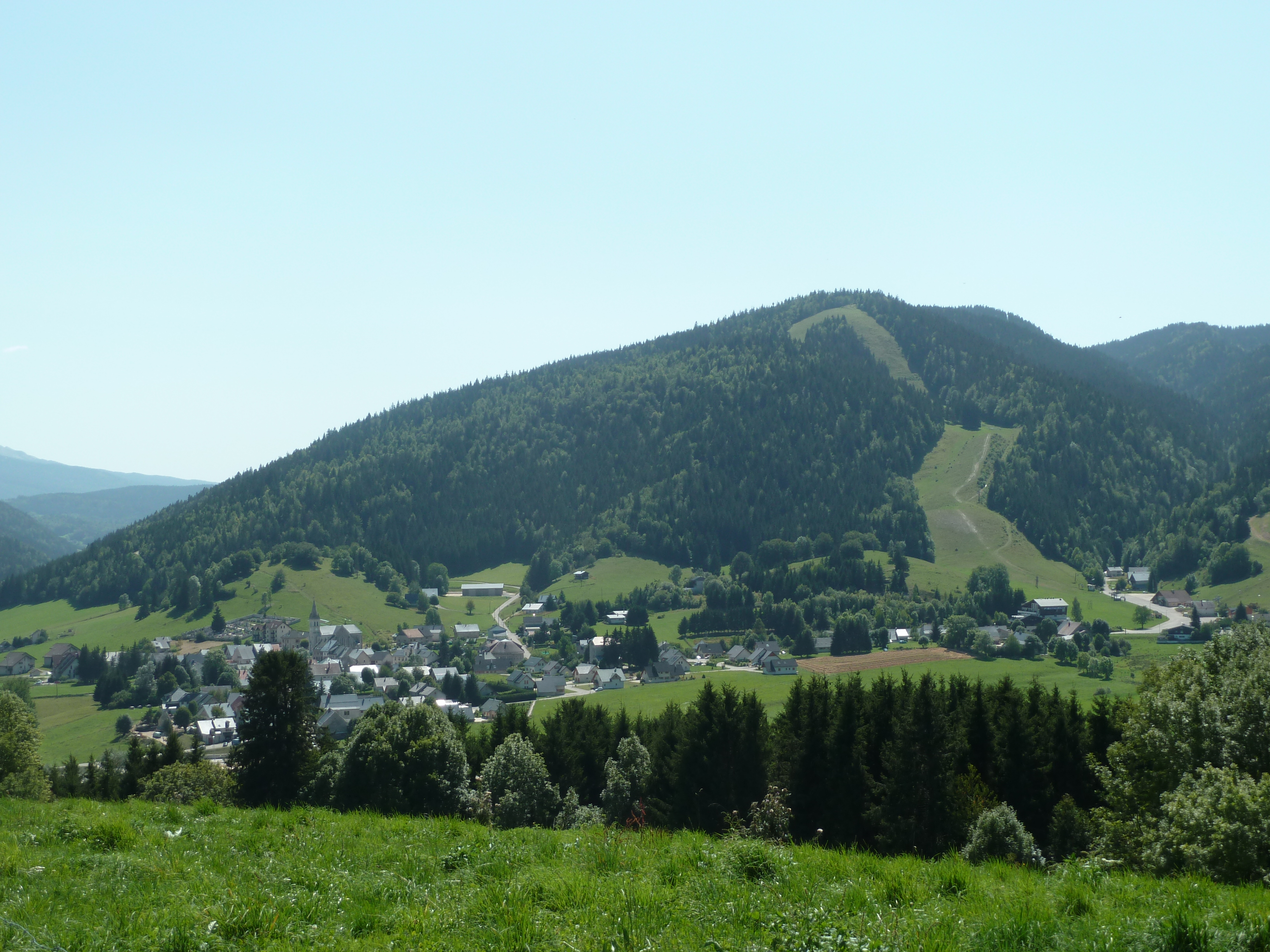 Méaudre (38) : Vue générale de la commune.